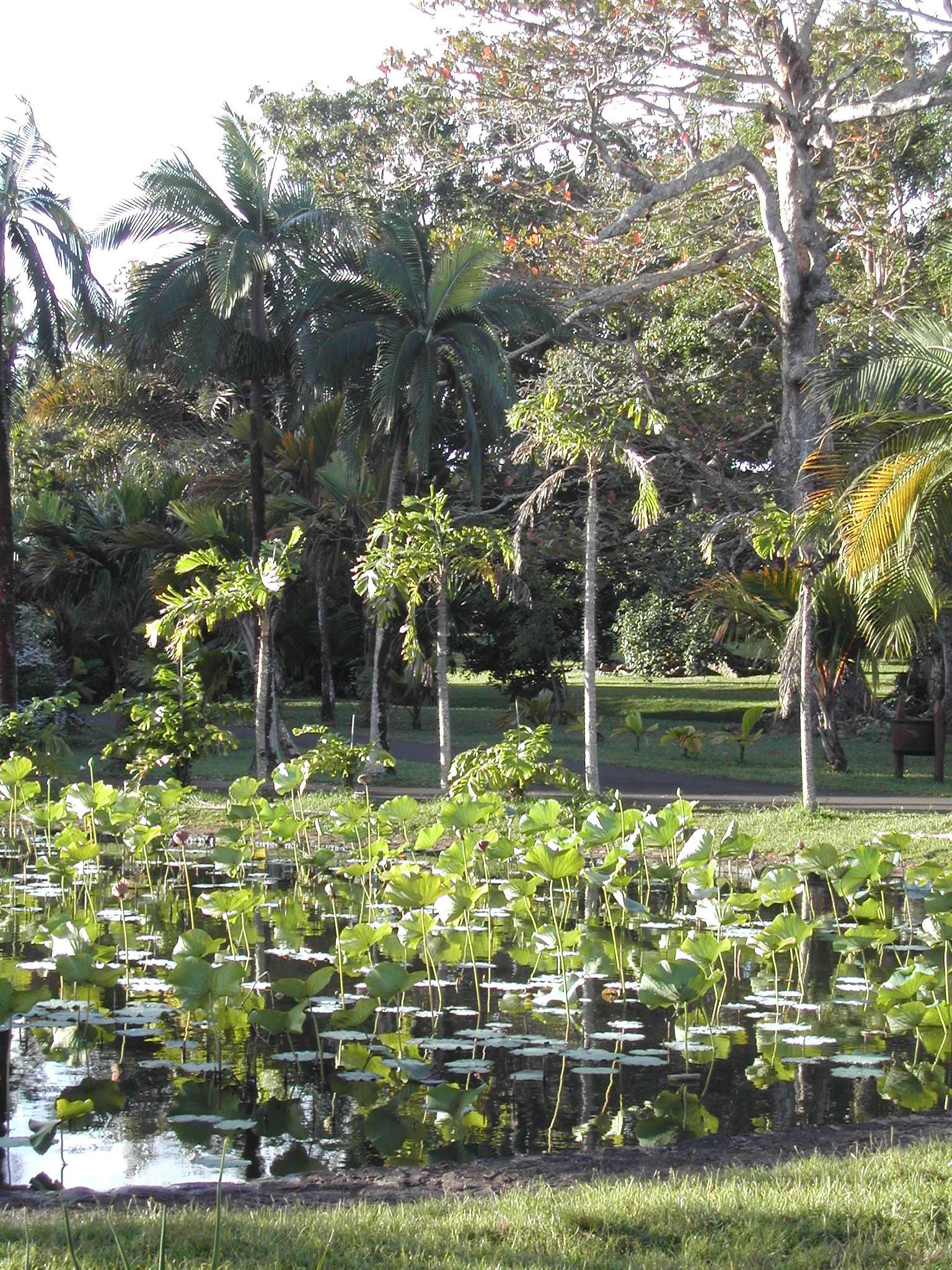 Photo prise dans le Jardin de Pamplemousses, à Maurice.